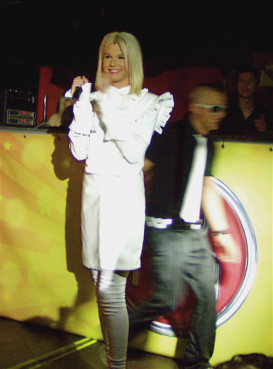 Борис Апрєль на "Шоуманії. Live".